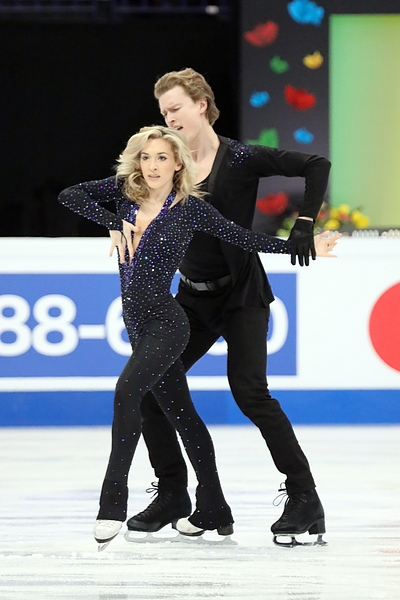 Изабелла Тобиас / Илья Ткаченко (Израиль) на чемпионате мира 2017